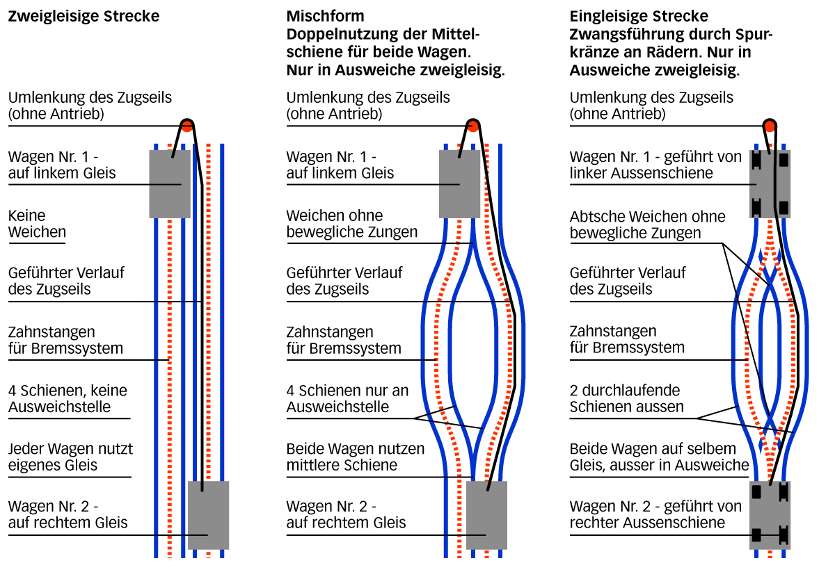 Schemazeichnung drei verschiedener Gleisbilder von Wasserballastbahnen.Beispielhaft für drei Grundtypen sind: die Malbergbahn in Bad Ems, Deutschland, - stillgelegt (links),die Nerobergbahn in Wiesbaden, Deutschland (Mitte) unddie Funiculaire Neuveville–St.Pierre in Freiburg, Schweiz (rechts).